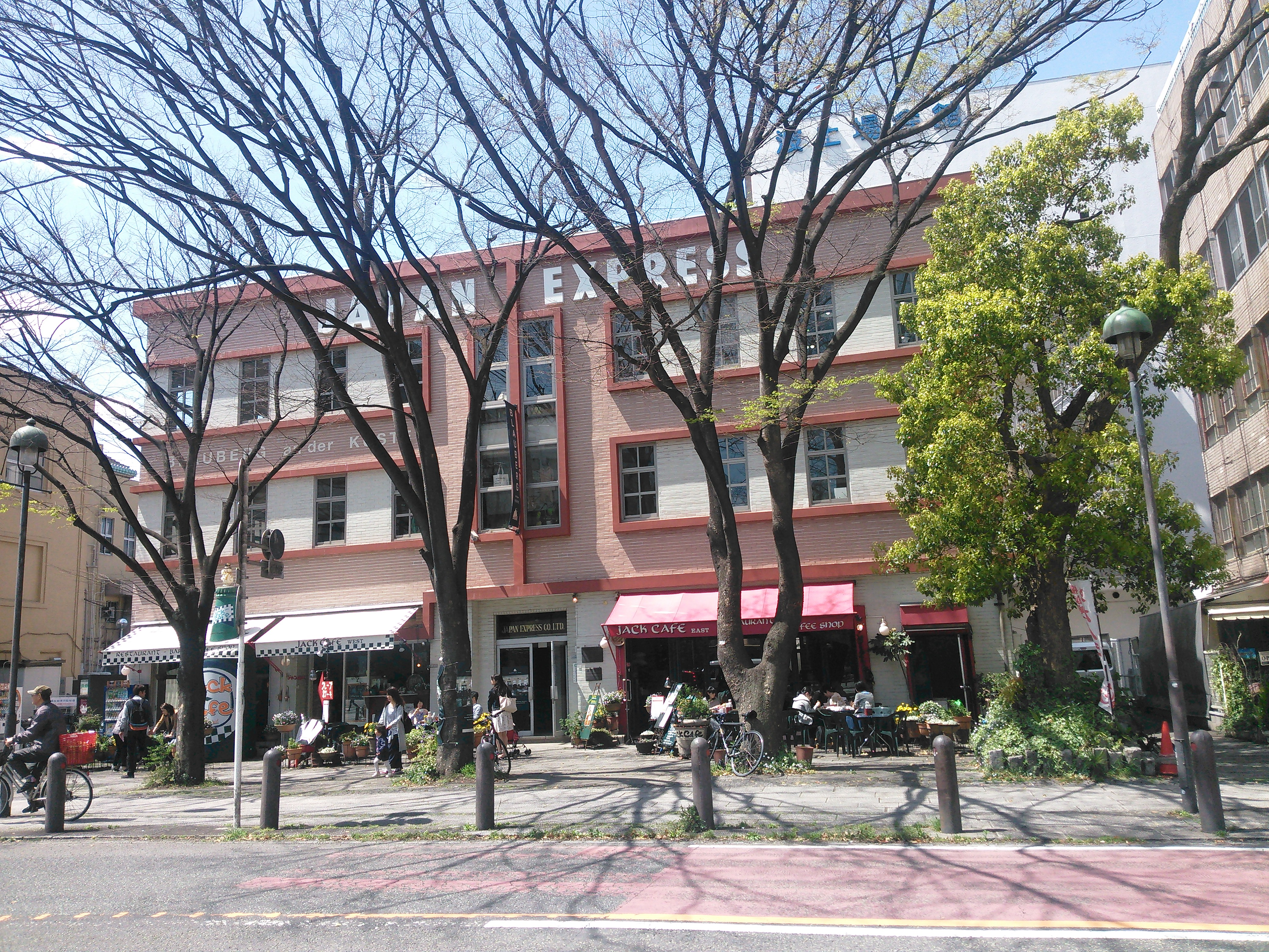 横浜市中区海岸通、ジャパンエキスプレスビル